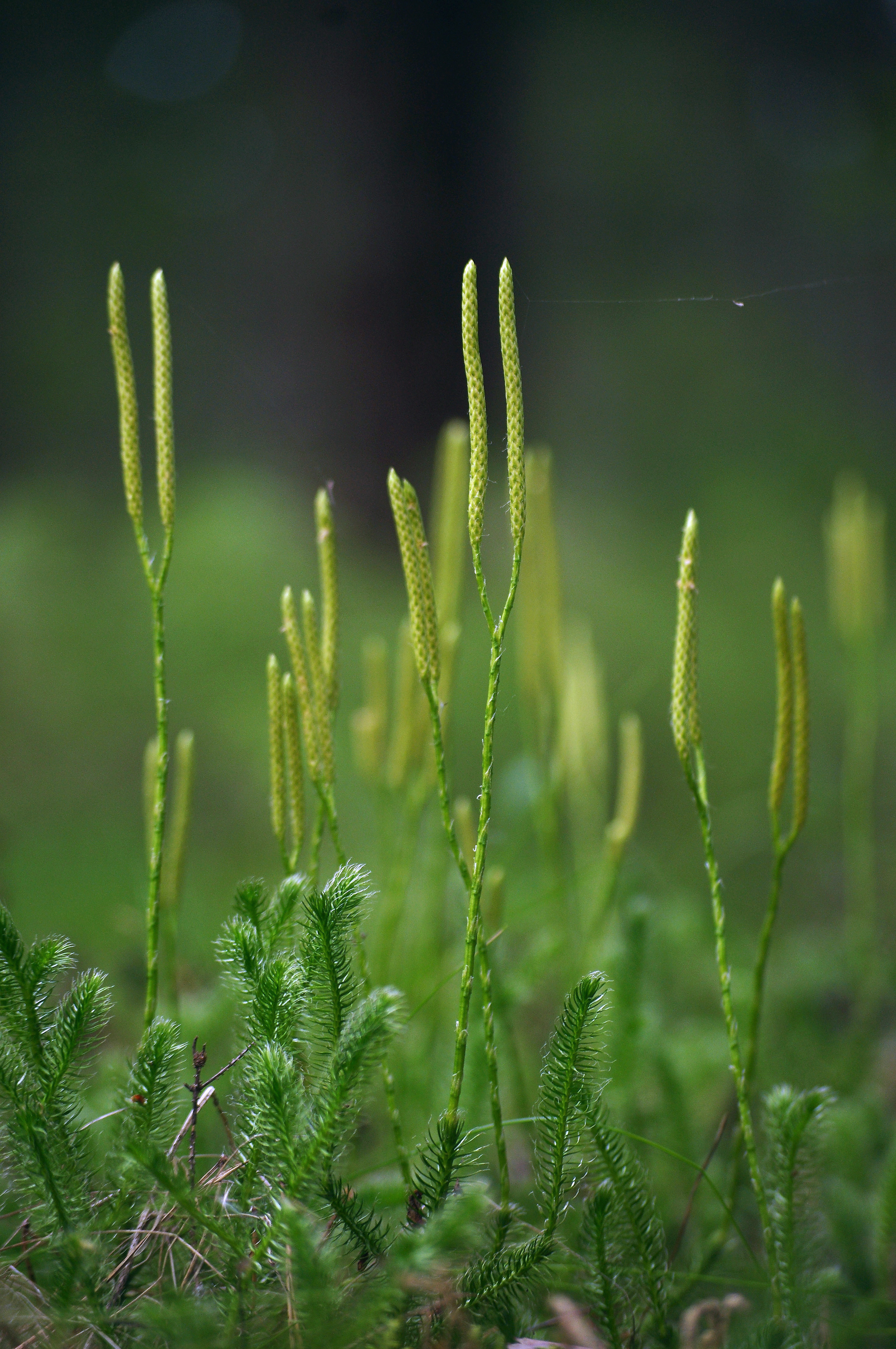 Karukold Albu vallas Järvamaal 11.08.2010